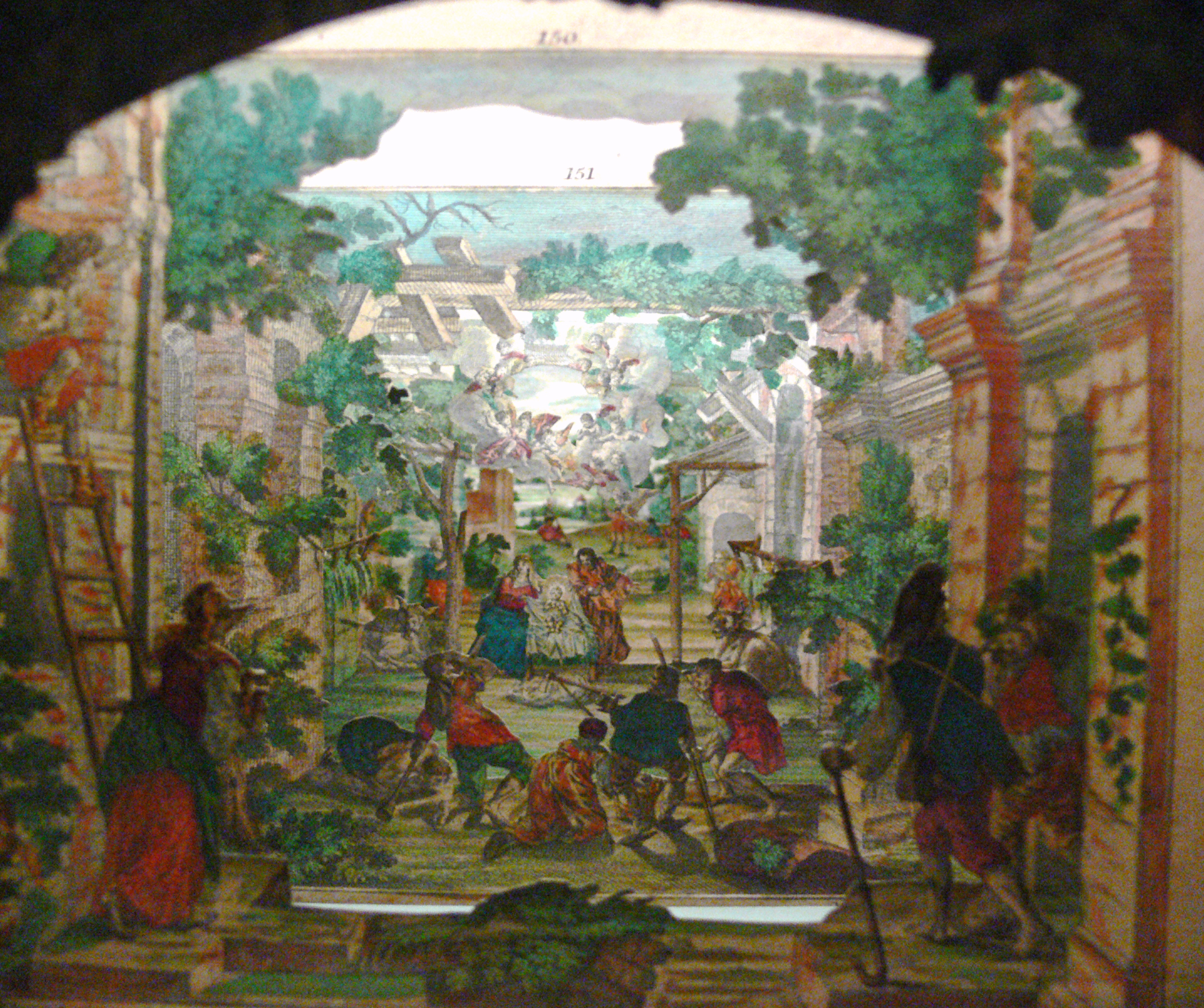 Guckkastenkrippe aus der Offizin Martin Engelbrecht, Szene: Anbetung der Hirten, Augsburg um 1840/1850; Krippensammlung des Bayerischen Nationalmuseums, München